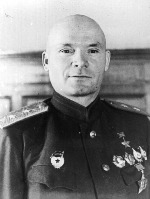 Дмитрий Данилович Лелюшенко (1901 — 1987) — видный военачальник